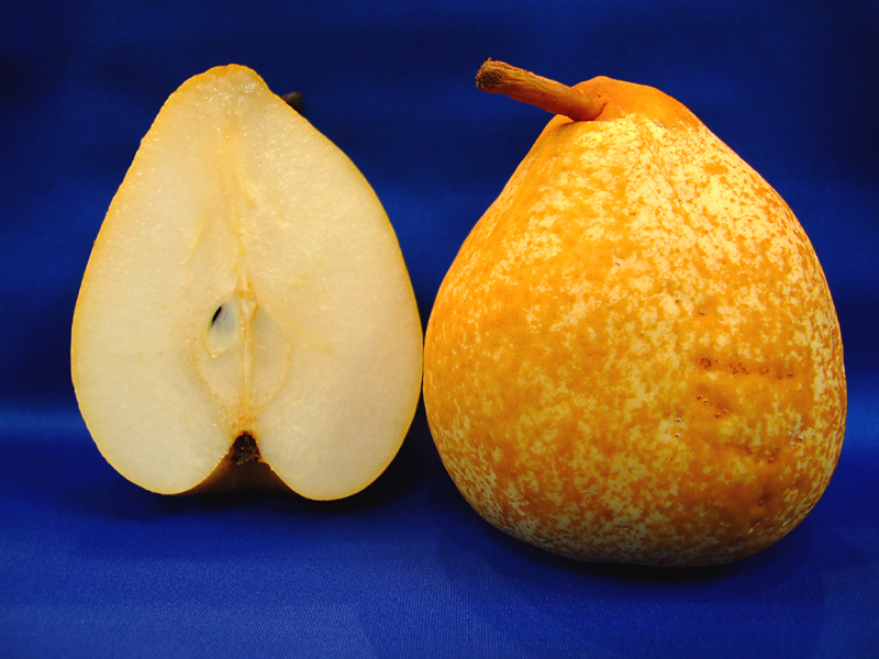 ゼネラル・レクラーク。追熟が進み、果皮が黄変したもの。果皮にさびが多く、ほどよい酸味があるのが特徴。